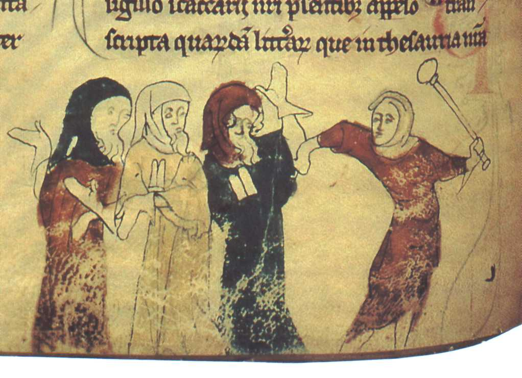 Miniature showing the expulsion of Jews following the Edict of Expulsion by Edward I of England (18 July 1290). Marginal Illustration from the Rochester Chronicle (British Library, Cotton Nero D. II.), folio 183v. fr. Sur l'illustration, les Juifs arborent la tabula en forme de Tables de la Loi imposée par Henry III d'Angleterre pour les discriminer, dès 1253. Henri III avait précédemment fait construire le Domus Conversorum à Londres en 1232 pour pousser à la conversion des Juifs au christianisme et ses efforts s'intensifièrent après 1239, quand il ruina la communauté juive par des amendes exorbitantes puis fit exécuter des Juifs pour meurtre rituel en 1255 à Lincoln ; près de 10 % des Juifs d'Angleterre s'étaient convertis à la fin des années 1250.